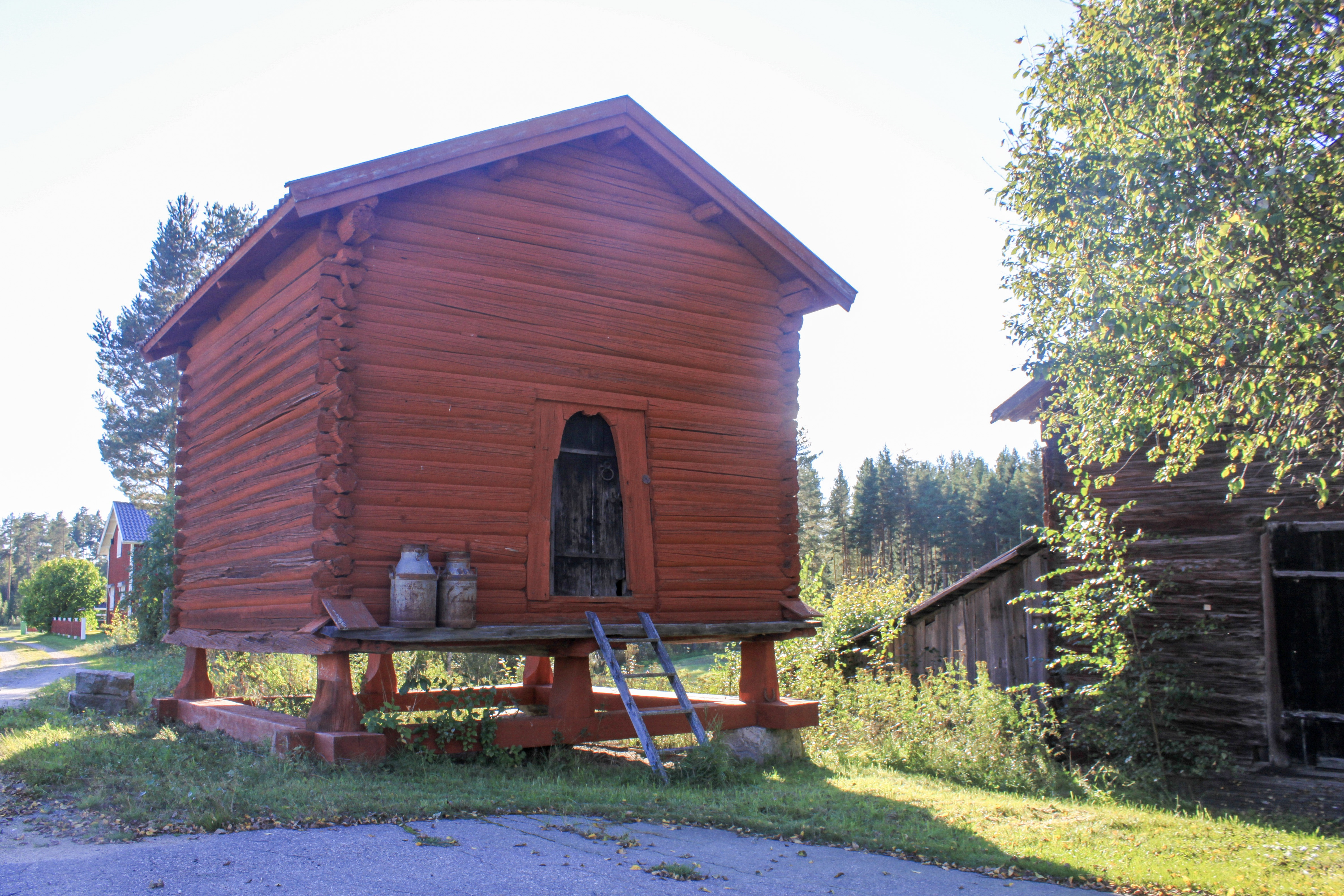 Härbret i Yg från framsidan.